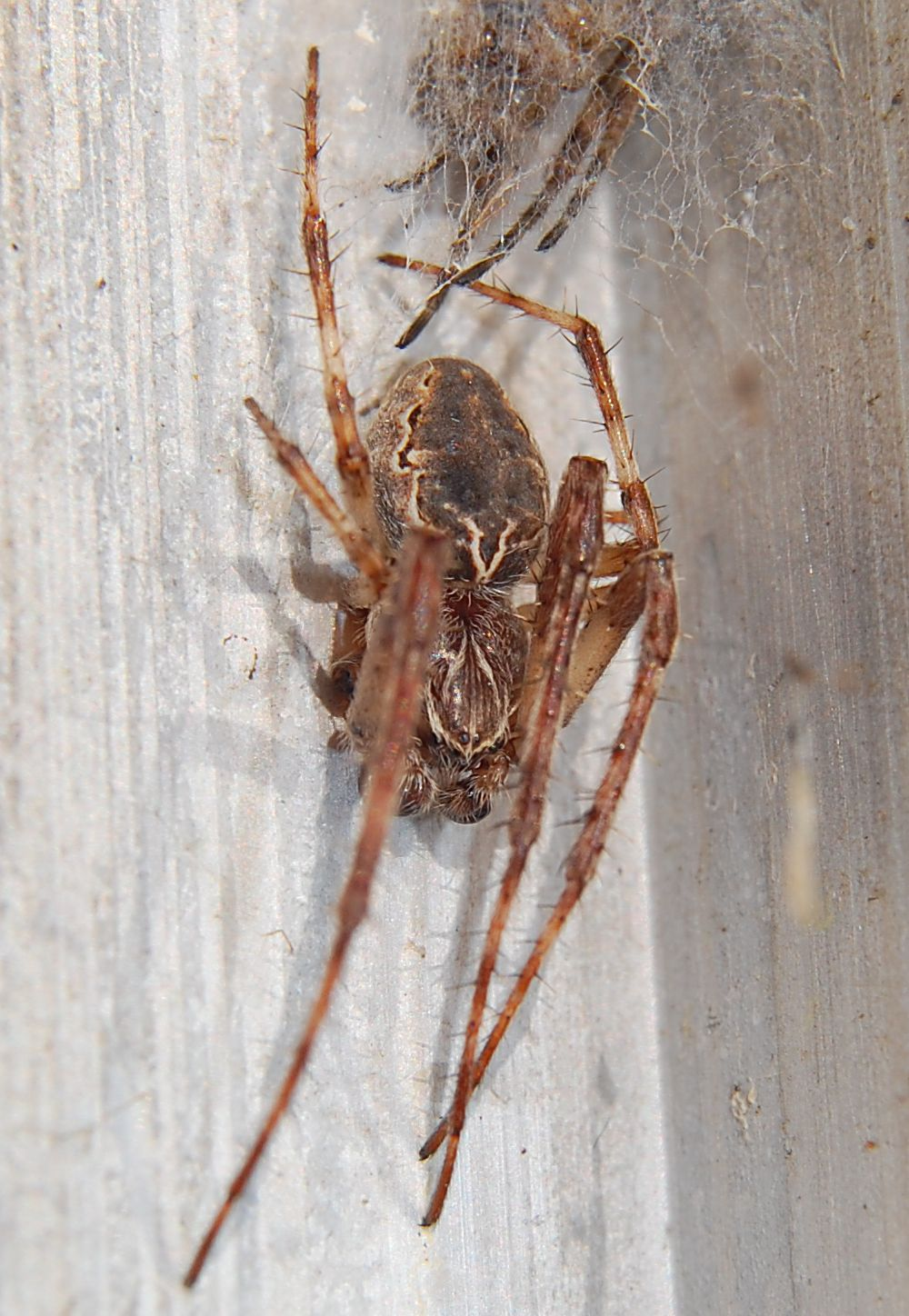 Larinioides sclopetarius, male